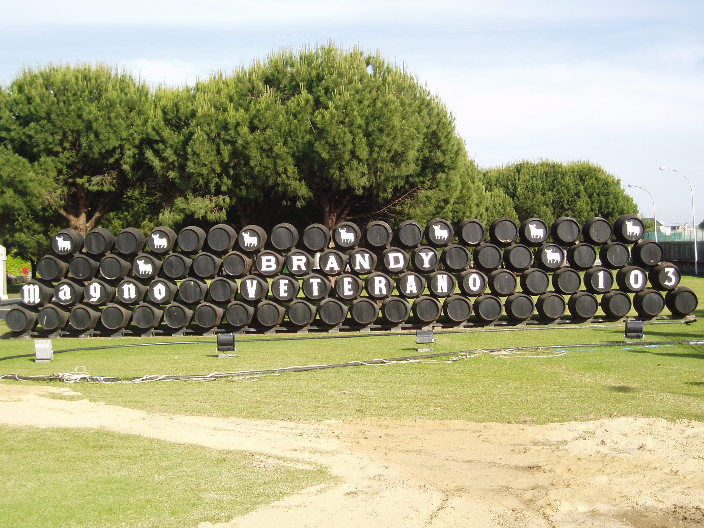 Botas anunciando Brandy de Jerez en El Puerto de Santa María.